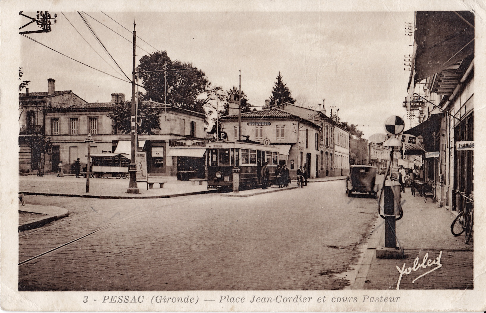 Carte postale ancienne éditée par Yobled, n°3 :PESSAC - Place Jean-Cordier et Cours Pasteur